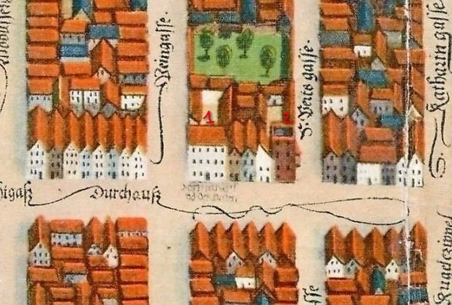 Plan Wrocławia - fragment z zaznaczeniem posesji pałacu Rybischów, aksonometryczny plan Wrocławia z 1562, kopia Partscha z 1826 r.